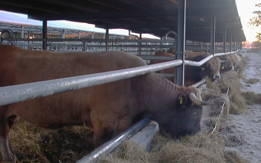 Aubrac-Bullen im Offenstall. Fotograf: Norman Utke Ouelle: selbst 2004 aufgenommen Kategorie:Bild:Gebäude